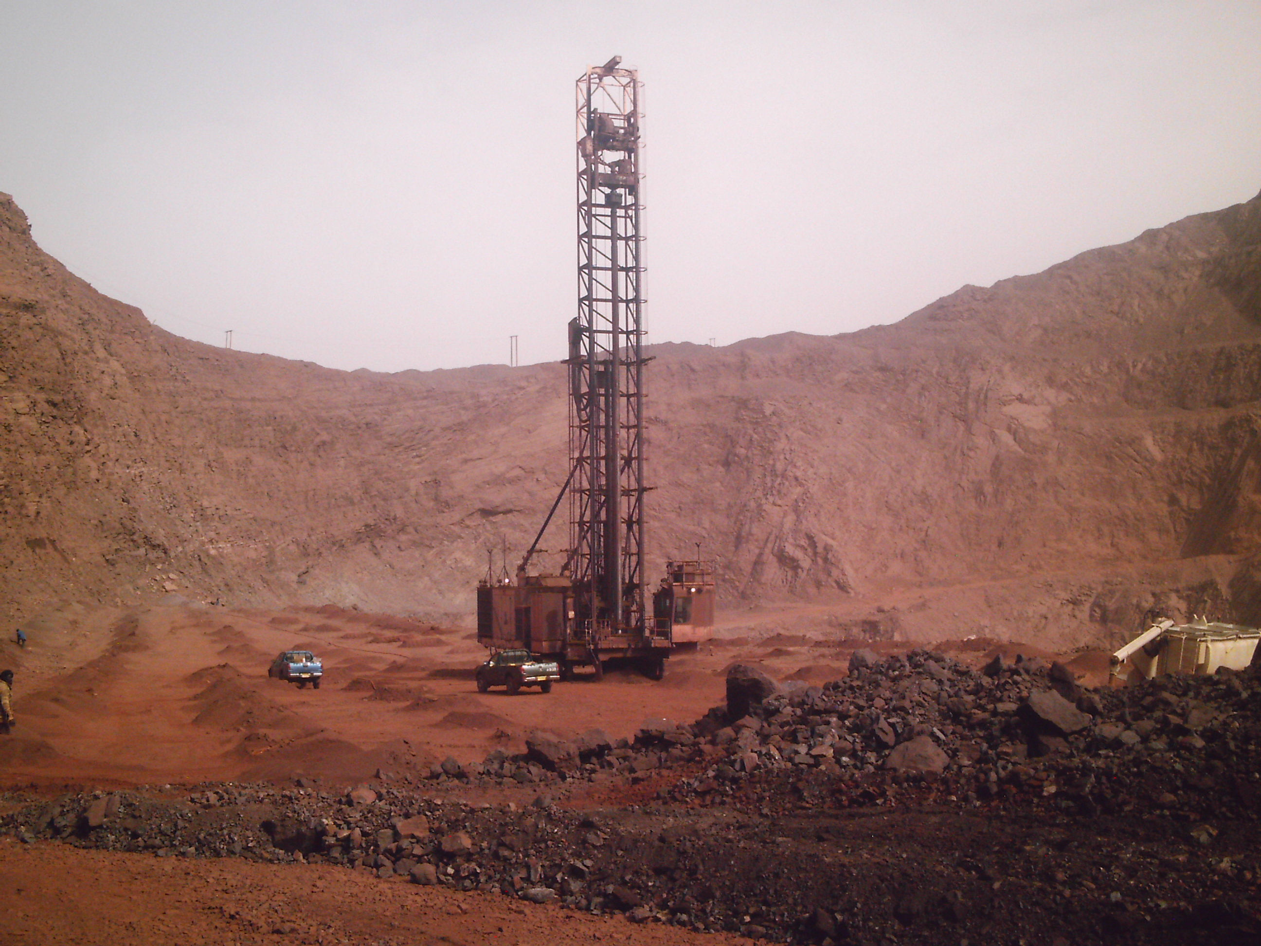 [Jemal Oumar] Mali hopes to develop the wealth of resources in the Taoudeni basin. تأمل مالي في تطوير ثروتها من الموارد الطبيعية في حوض تاودني Le Mali espère développer la richesse de ses ressources dans le bassin de Taoudeni.